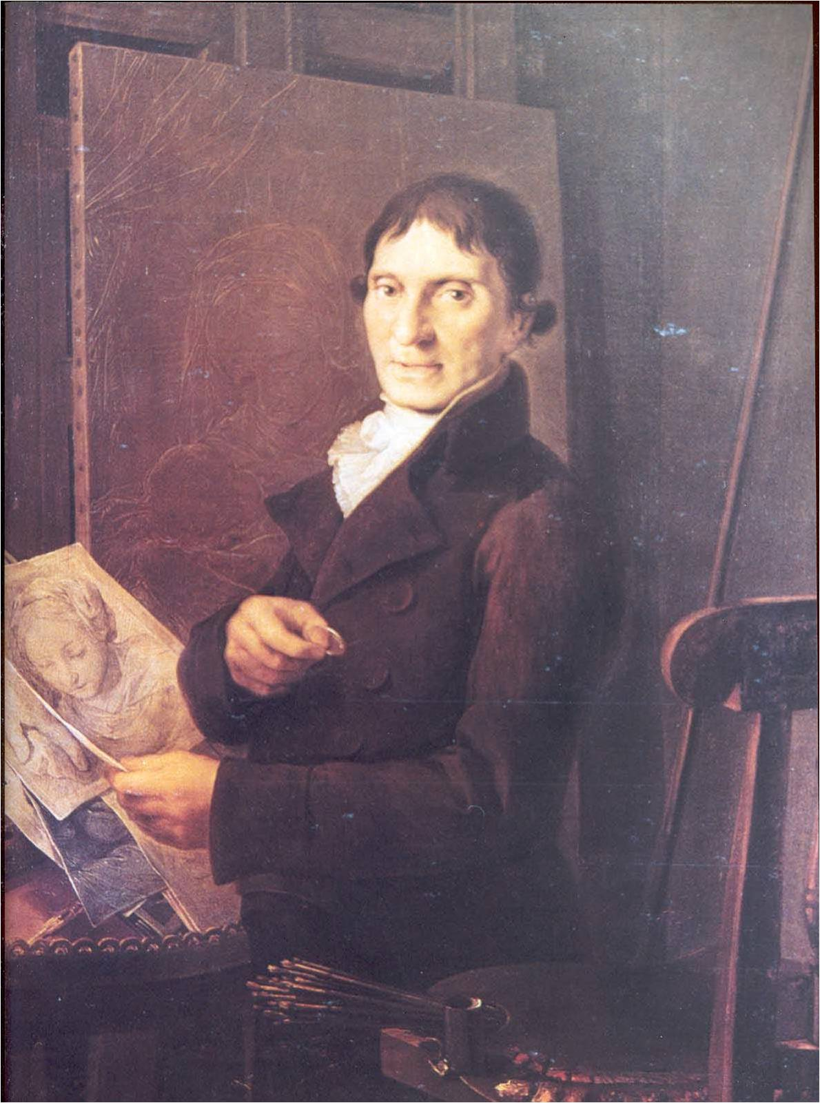 Retrato del pintor español Luis Antonio Planes (1742-1821).